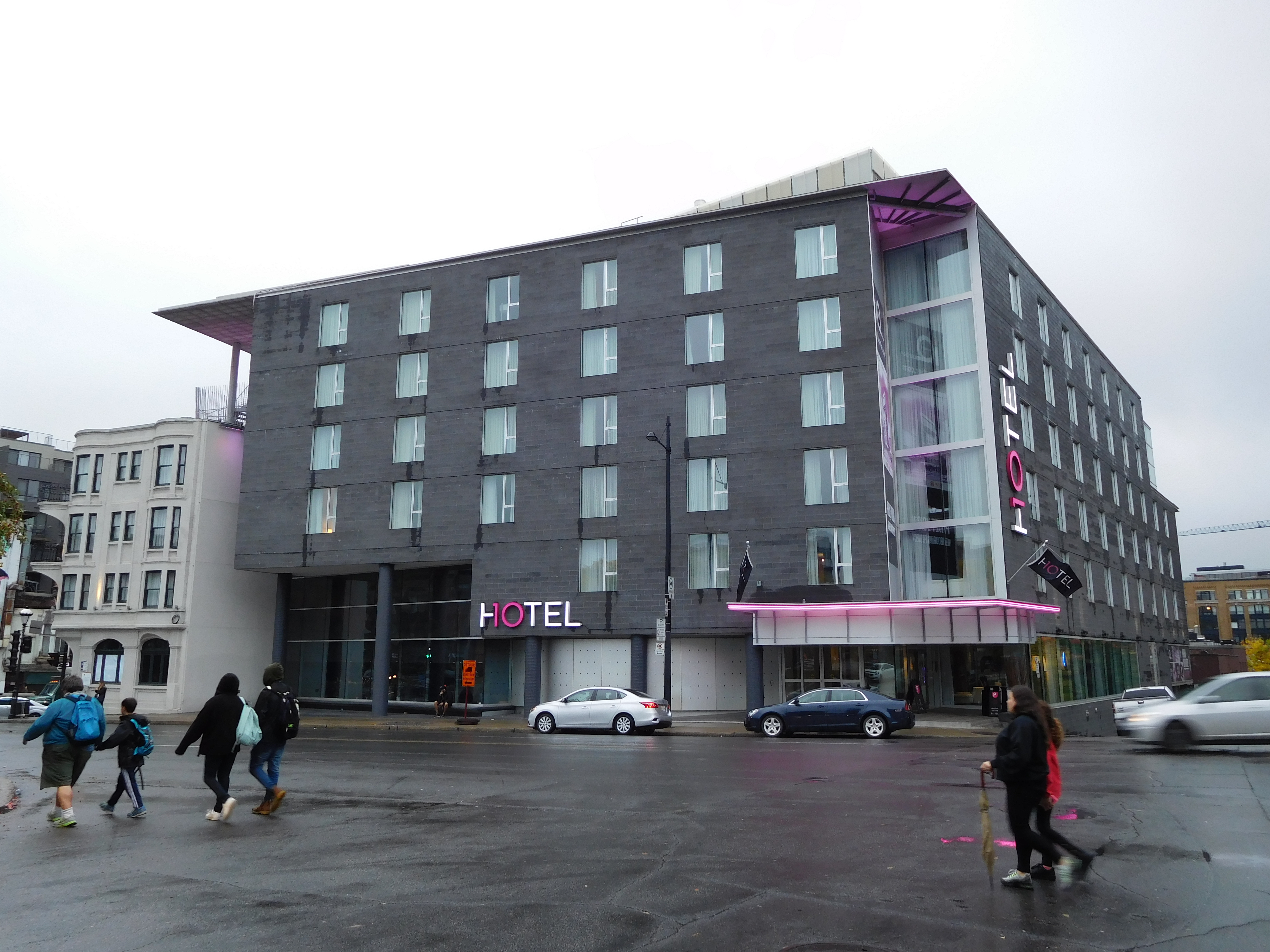 Hôtel 10, situé au 10, rue Sherbrooke Ouest / boulevard Saint-Laurent, Montréal